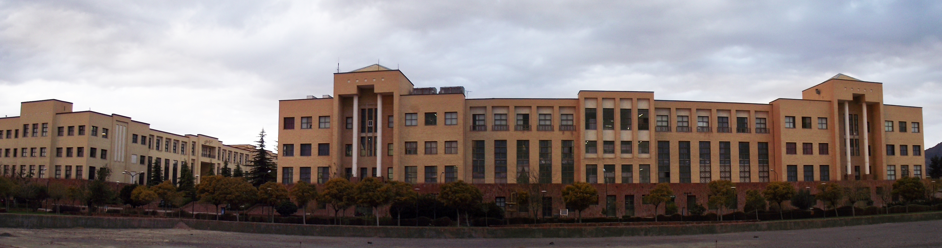 سراسرنمایی از دانشگاه حکیم سبزواری